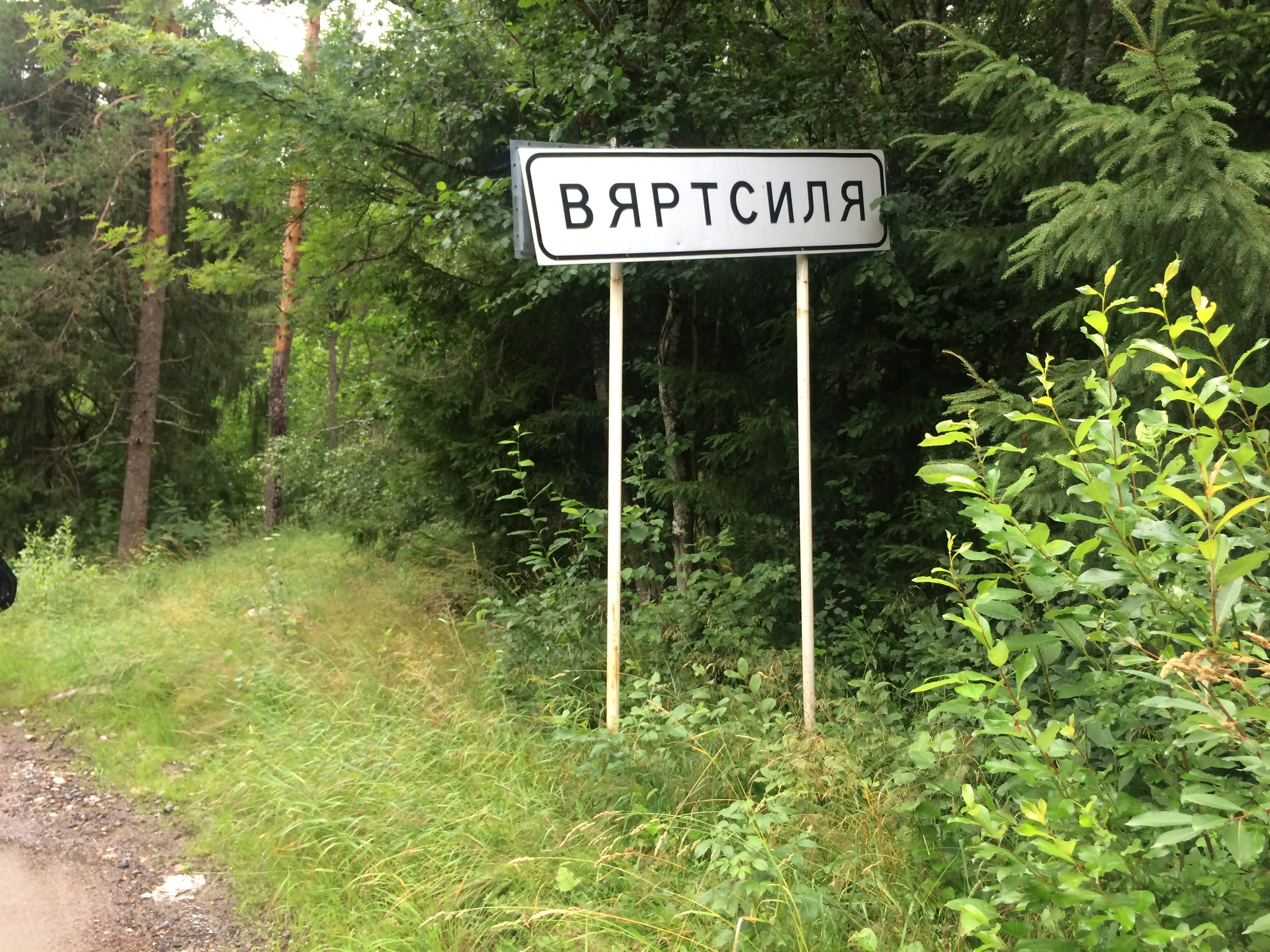 пгт Вяртсиля